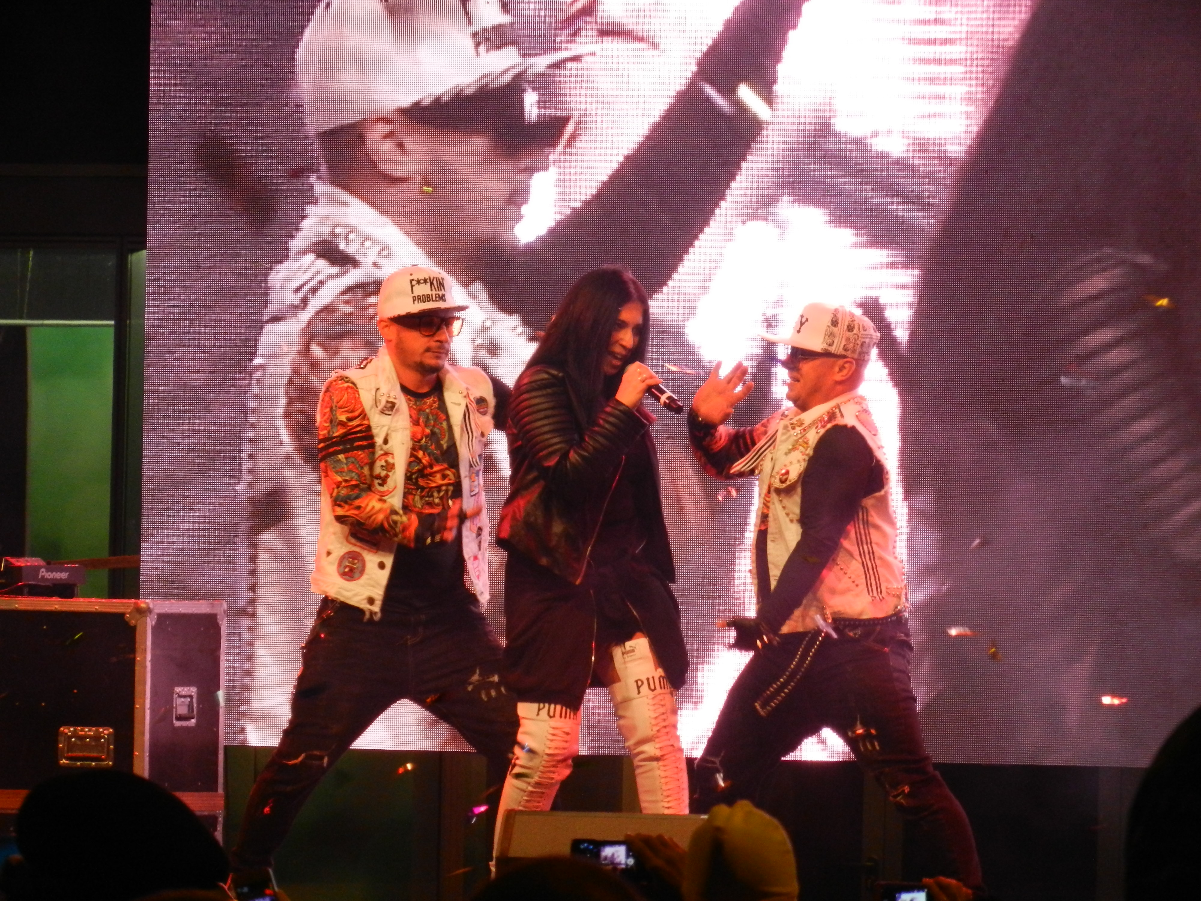 Группа Краски на концерте в Саратове, 1 октября 2017